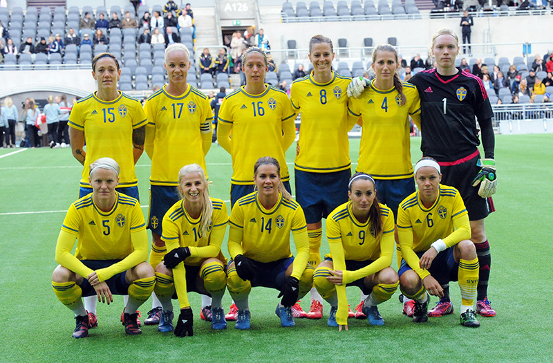 a_12_2524